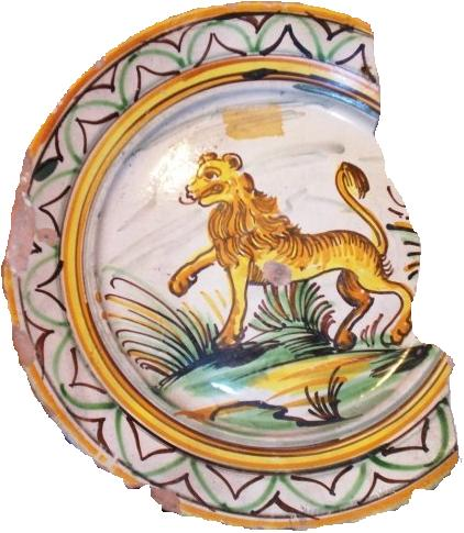 Piatto in ceramica cerretese raffigurante un leone e conservato presso il Museo civico e della ceramica cerretese di Cerreto Sannita (Bn).